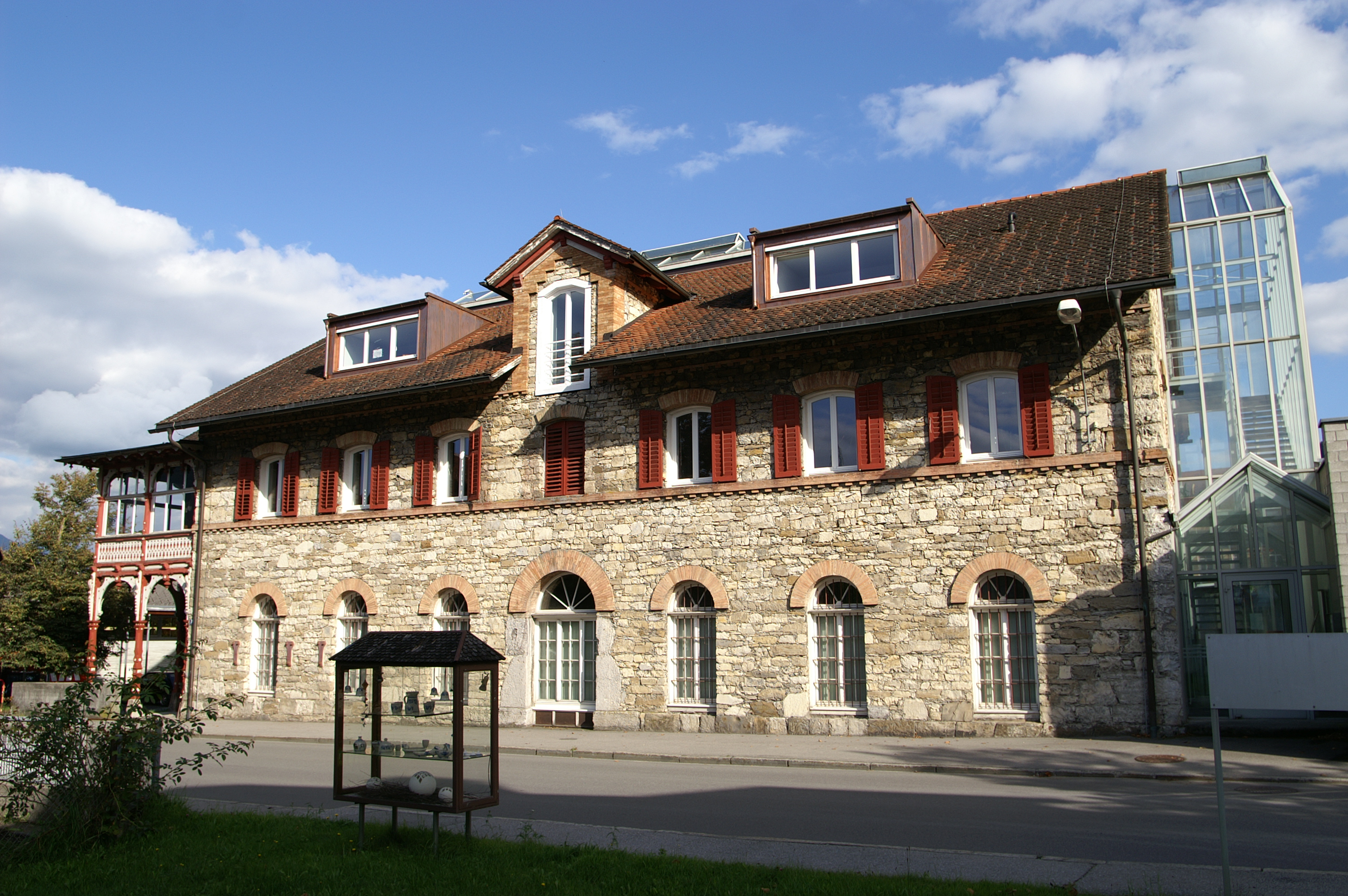 aus dem DEHIO Vorarlberg 1983: Bahnhofstrasse Nr.: 26 Metallwarenfabrik Schatzmann Gewerbliches Objekt, Mitte 19. Jh., Bruchstein unverputzt, Fenster mit Bogenschlüssen in Backstein, angebaut Holzveranda Ende 19. Jh. *** In Nenzing, Vorarlberg. *** Veröffentlicht: Barbara Motter & Barbara Grabher-Schneider in "Orte-Fabriken-Geschichten ISBN 978-37099-7097-3 2014